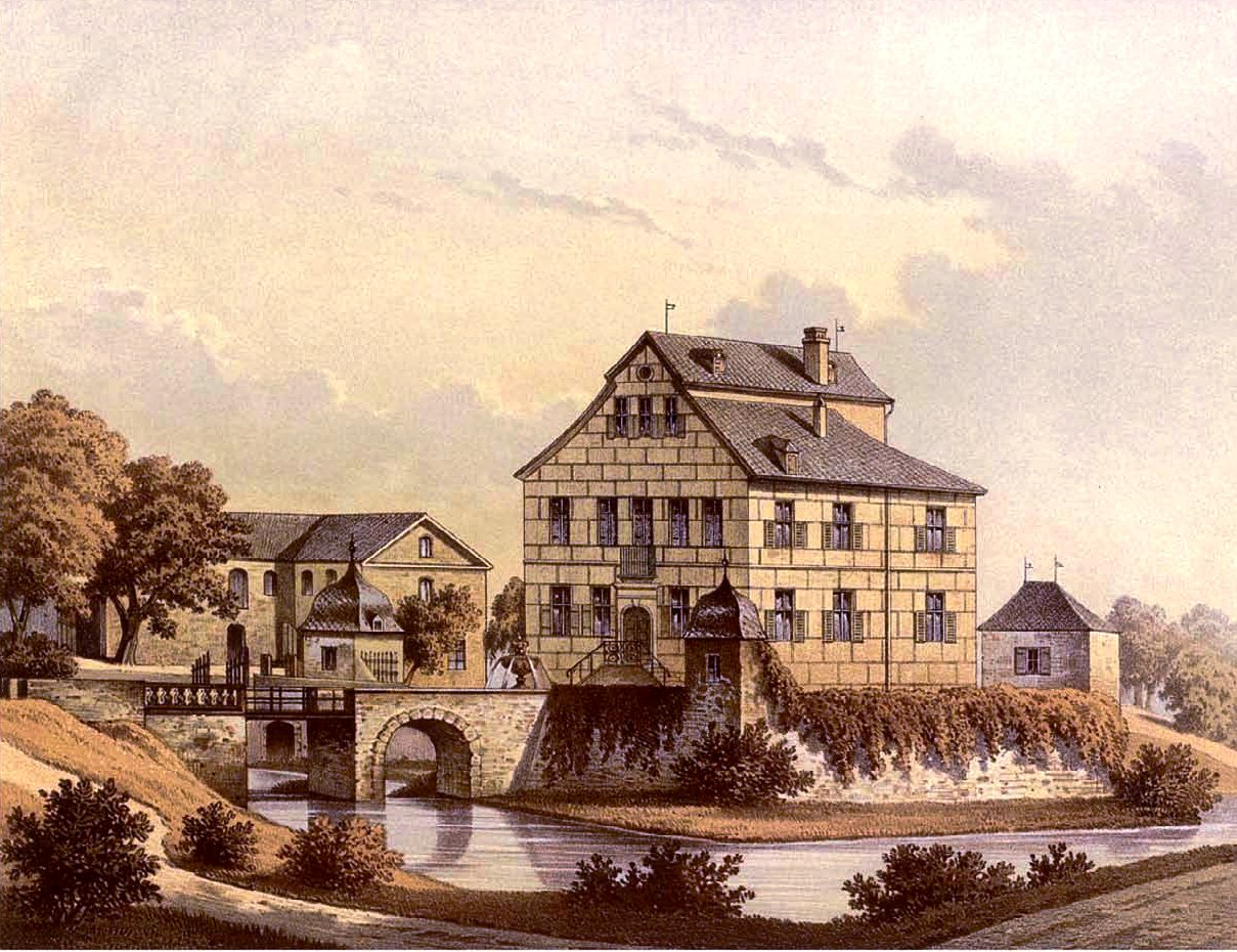 Kitzburg